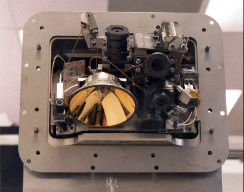 Descent Imager/Spectral Radiometer-instrument from Huygens